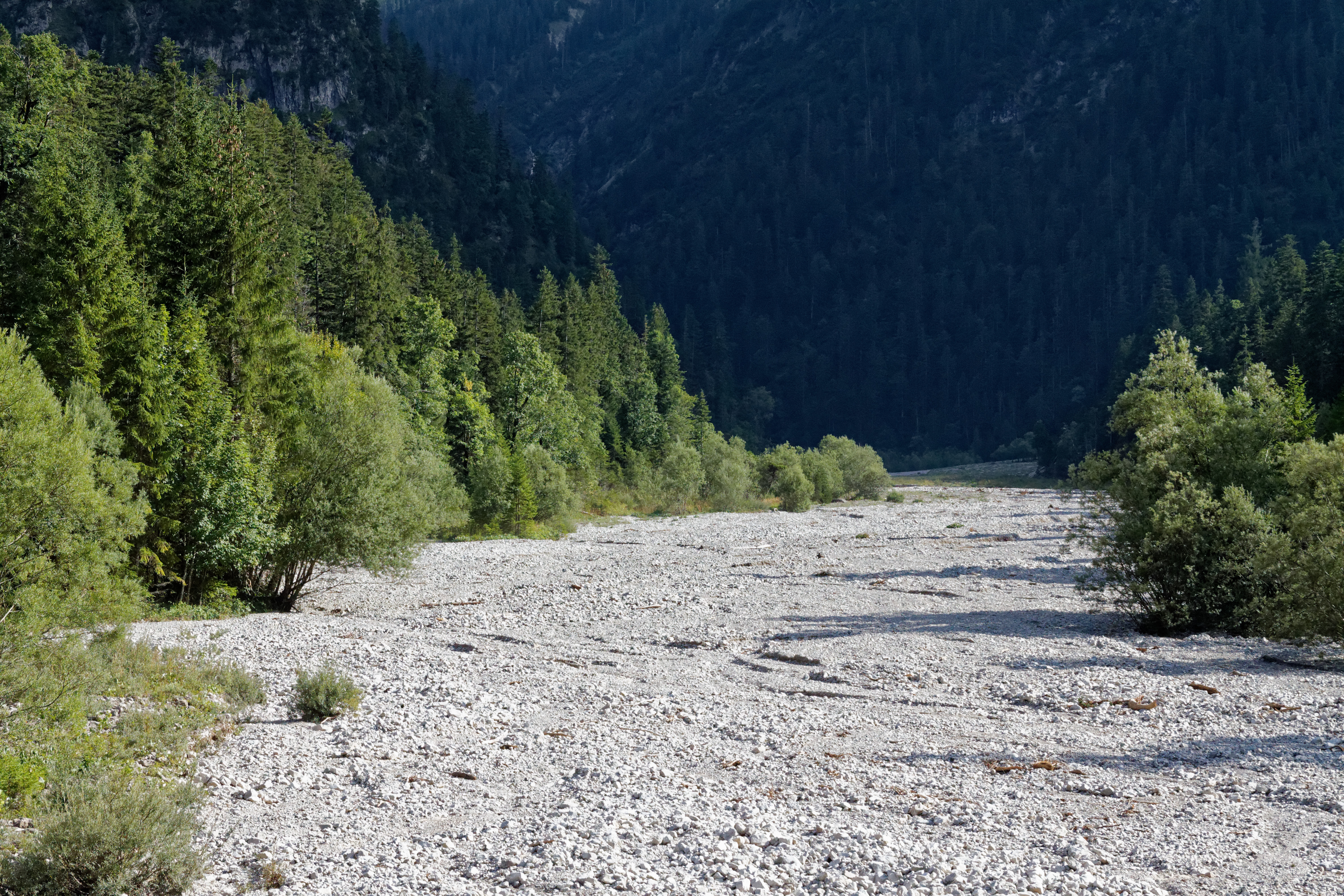 Bachbett des Neualmbachs kurz vor dem Zusammenfluss mit dem Fischbach zur Linder